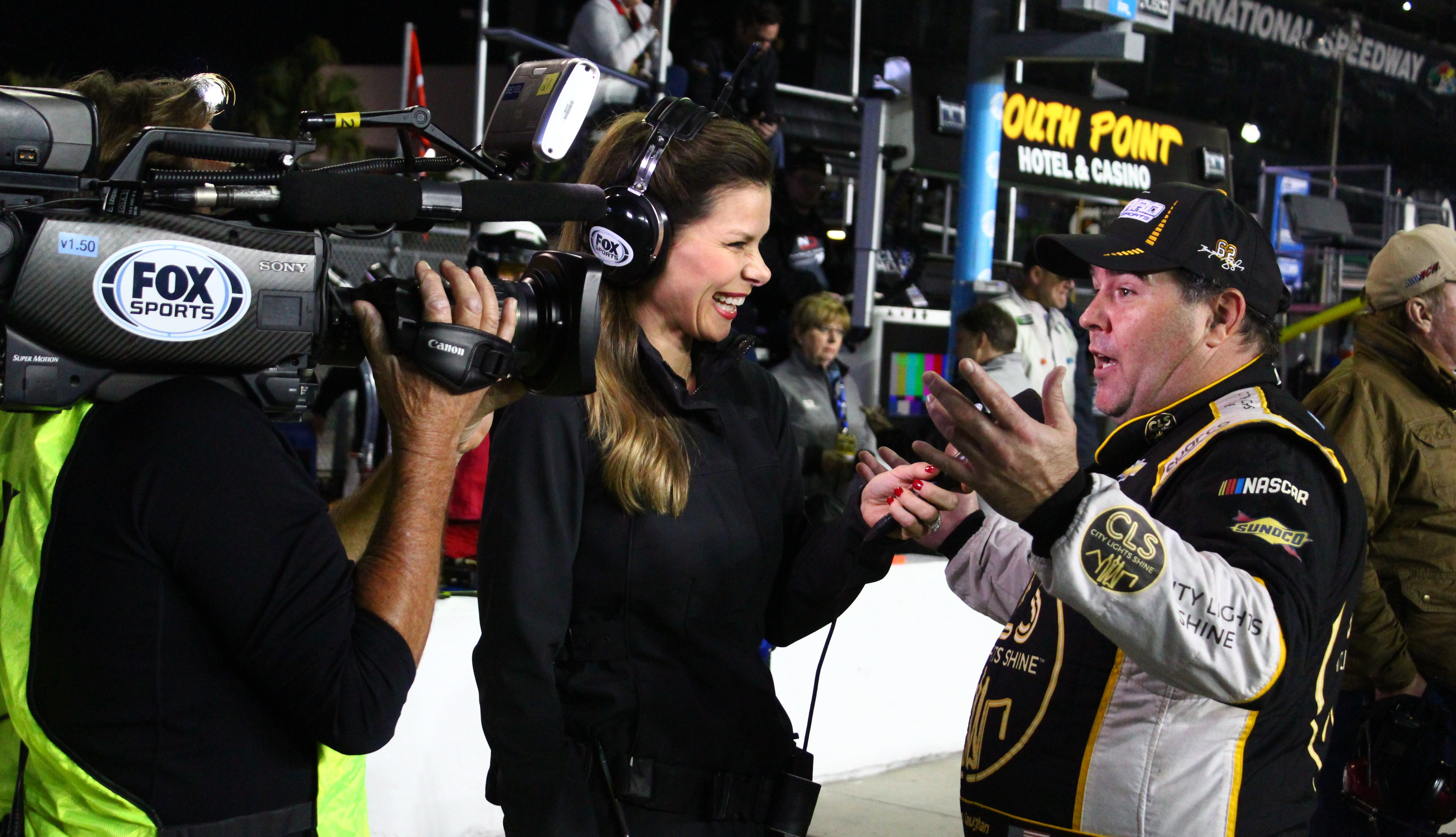 2019 Daytona 500